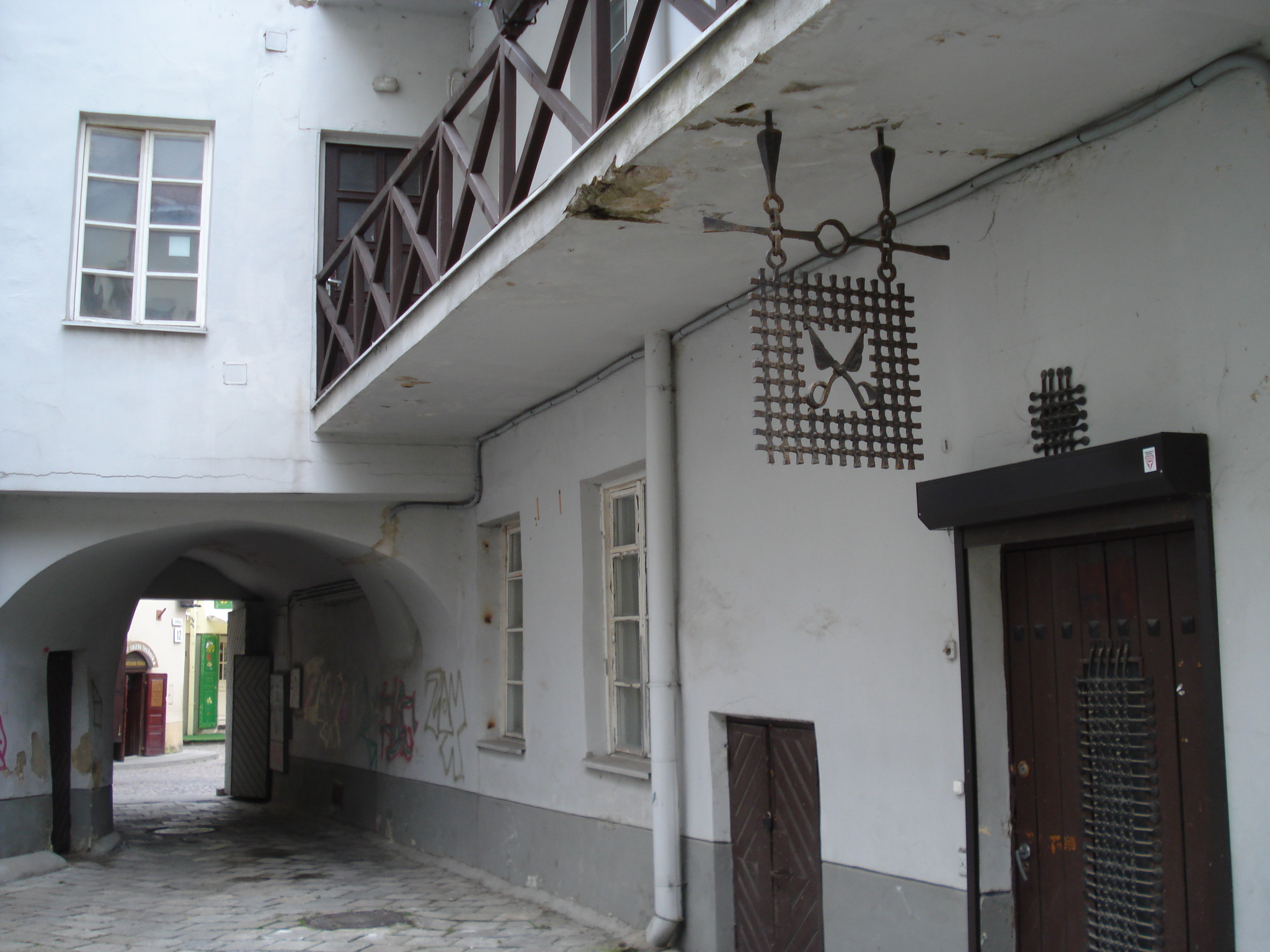 Courtyard in Vilnius. Gaono gatvė 10 / Stiklių 9 (Gaono street 10).